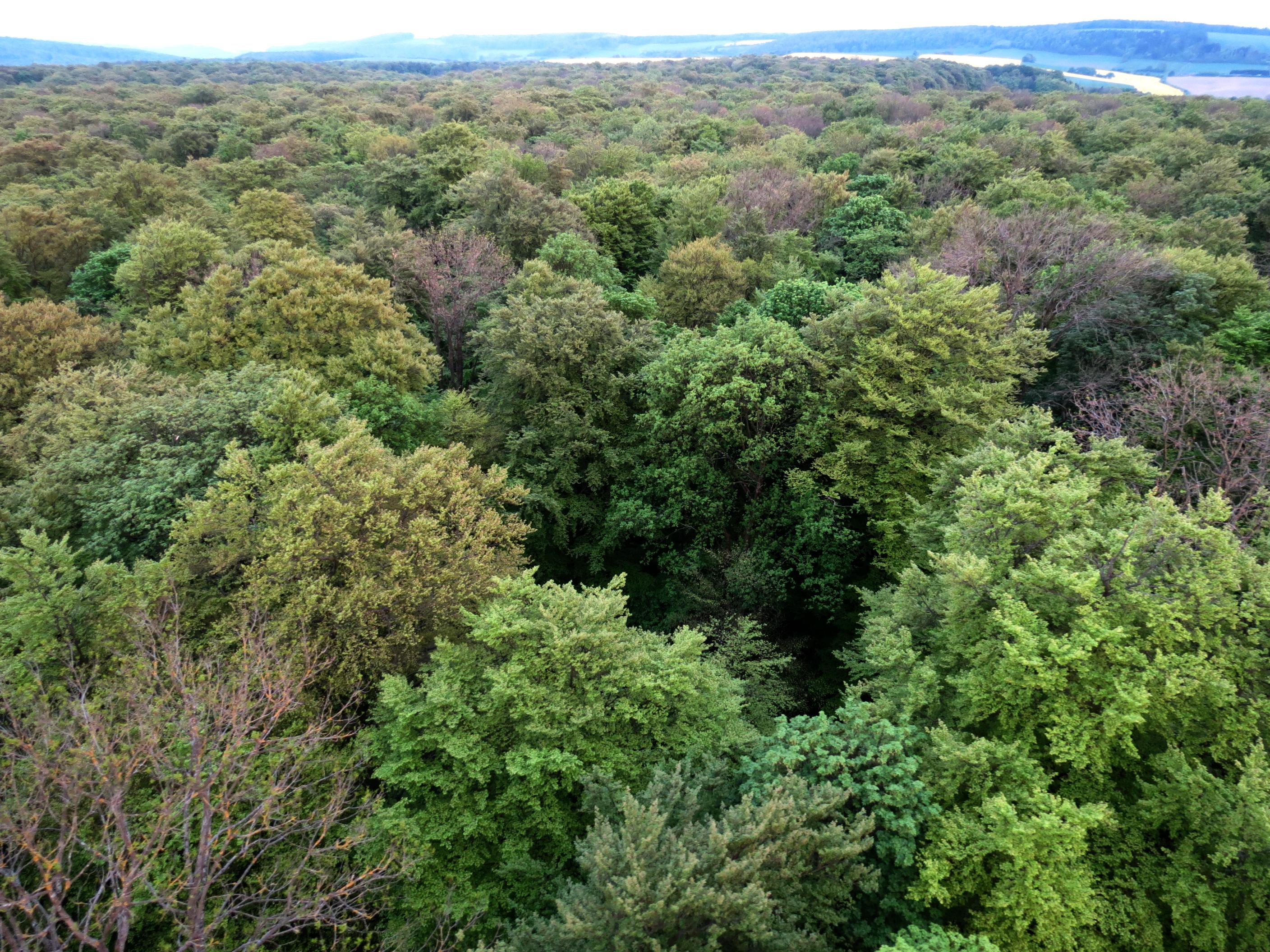 Teil des Oberdorlaer Holzes mit typischer Plenterstruktur.